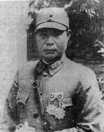 鄒洪（1897年－1945年），台籍國民革命軍將領。